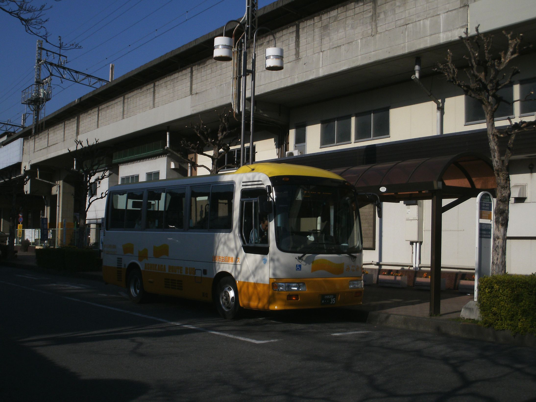 足利市生活路線バス「みなみ号」 足利市駅前にて